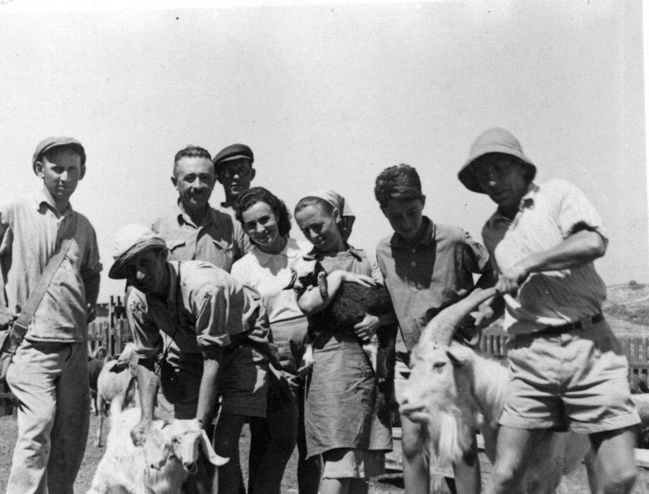 עובדי הדיר מעין השופט מצטלמים עם אביו של אריק שרון- שמואל ואריק בן ה-14.השנים באו לקנות עזים או כבשים מהדיר בעין השופט